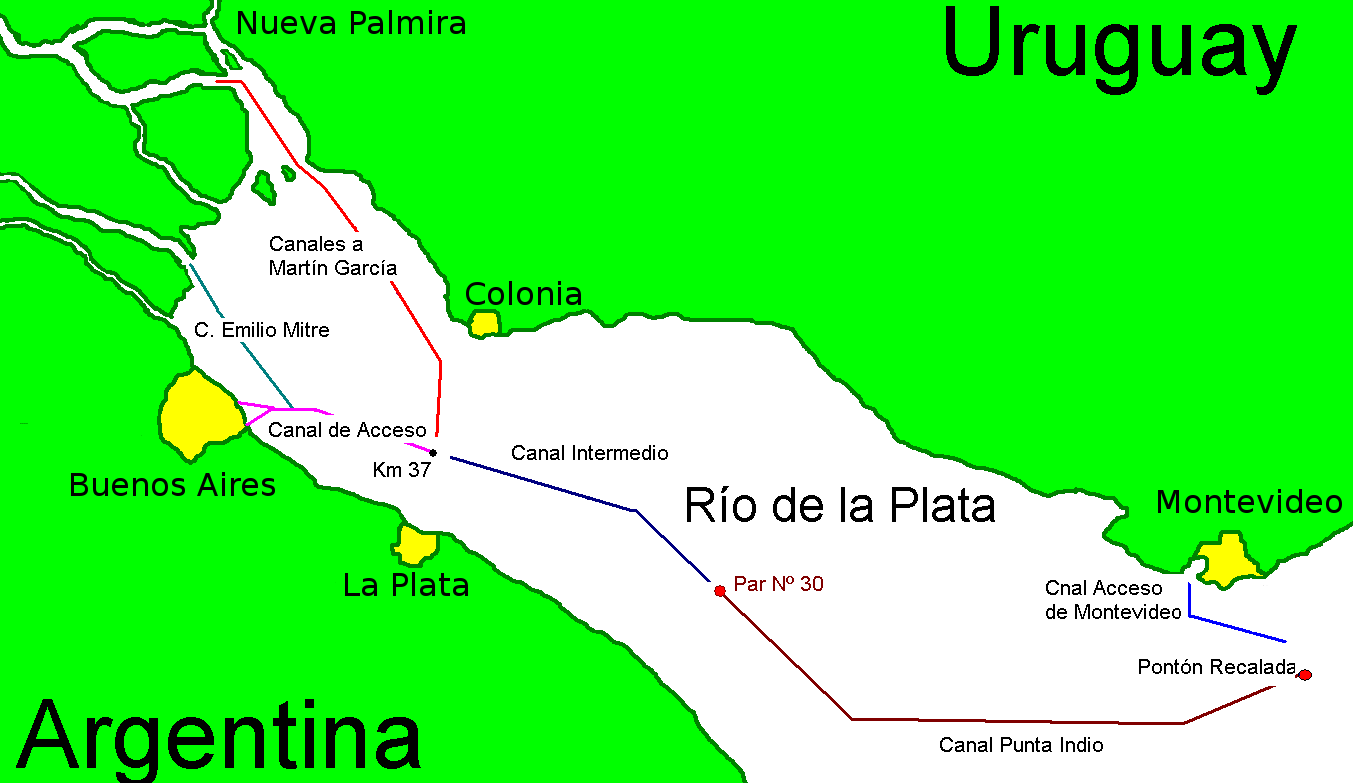 Main navigational channels on Rio de la Plata